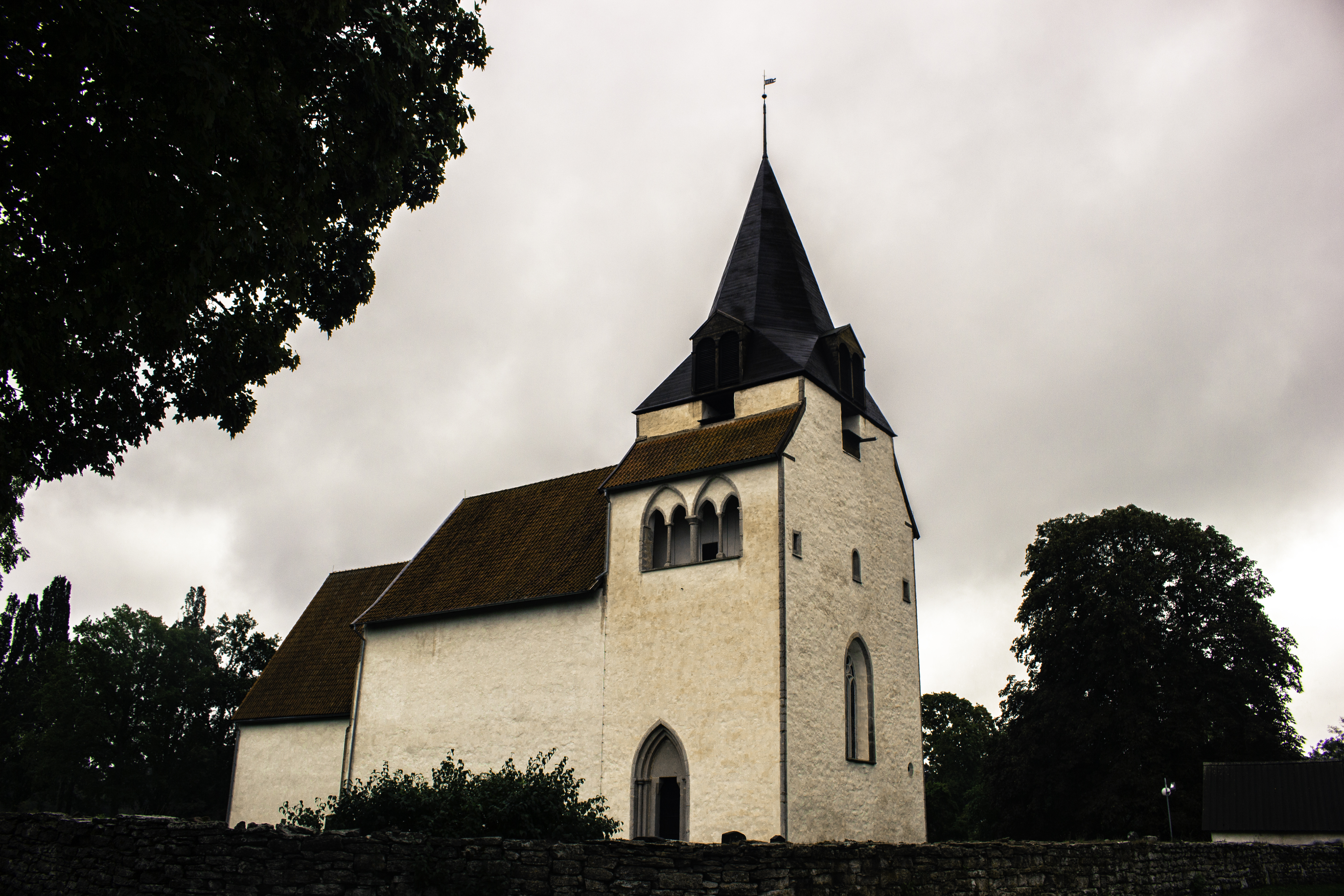 Vista dende o noroeste da igrexa de Väskinde, na illa sueca de Gotland.